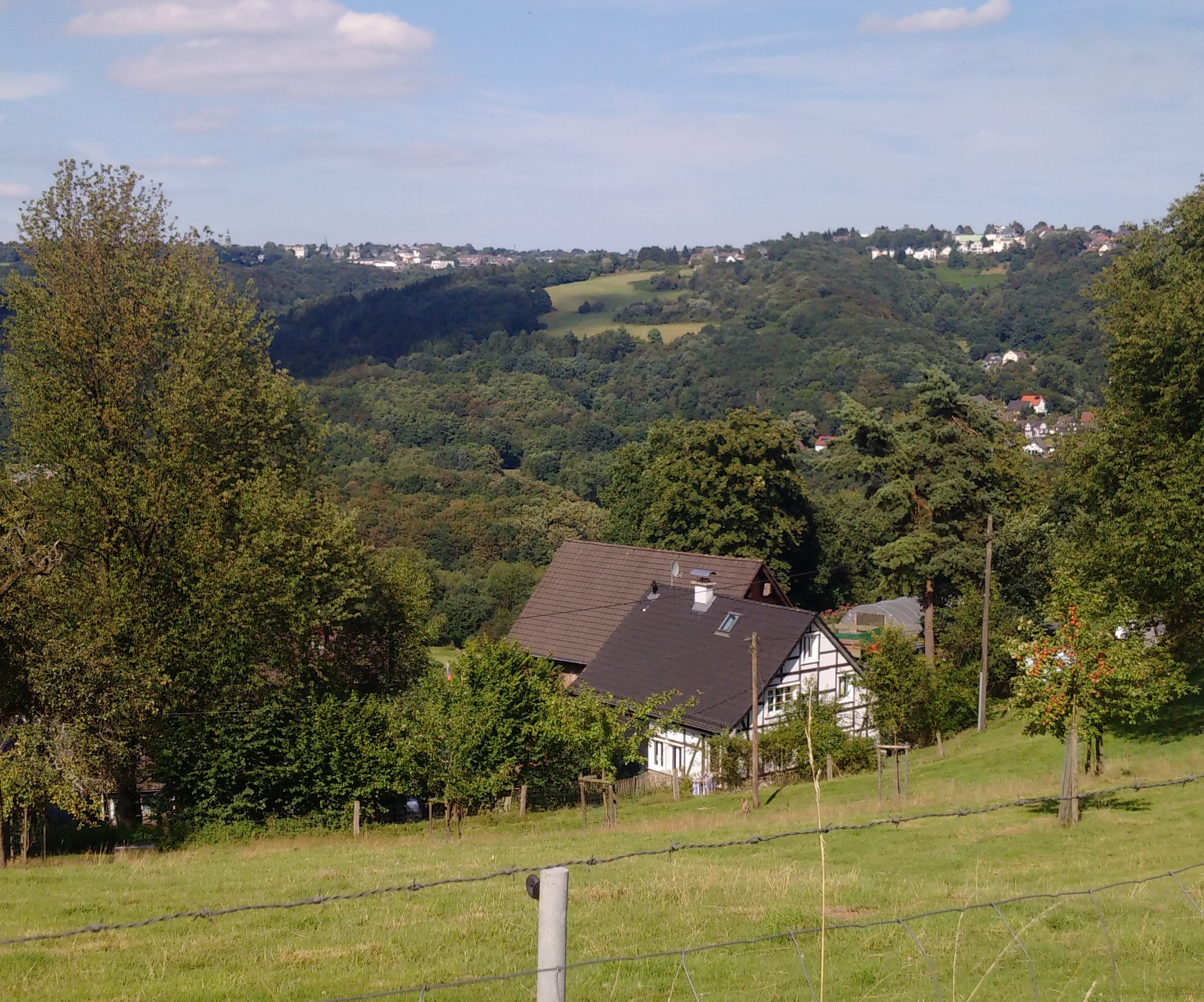 Blick über die Hofschaft Hasseldelle in Solingen, aufgenommen im Sommer 2016